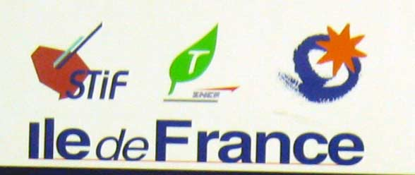 Logo Transilien (materiel de banlieue de l'agglomération parisienne) Lieu : Paris, France Date : Juin 2006 Auteur : Pline photo personnelle